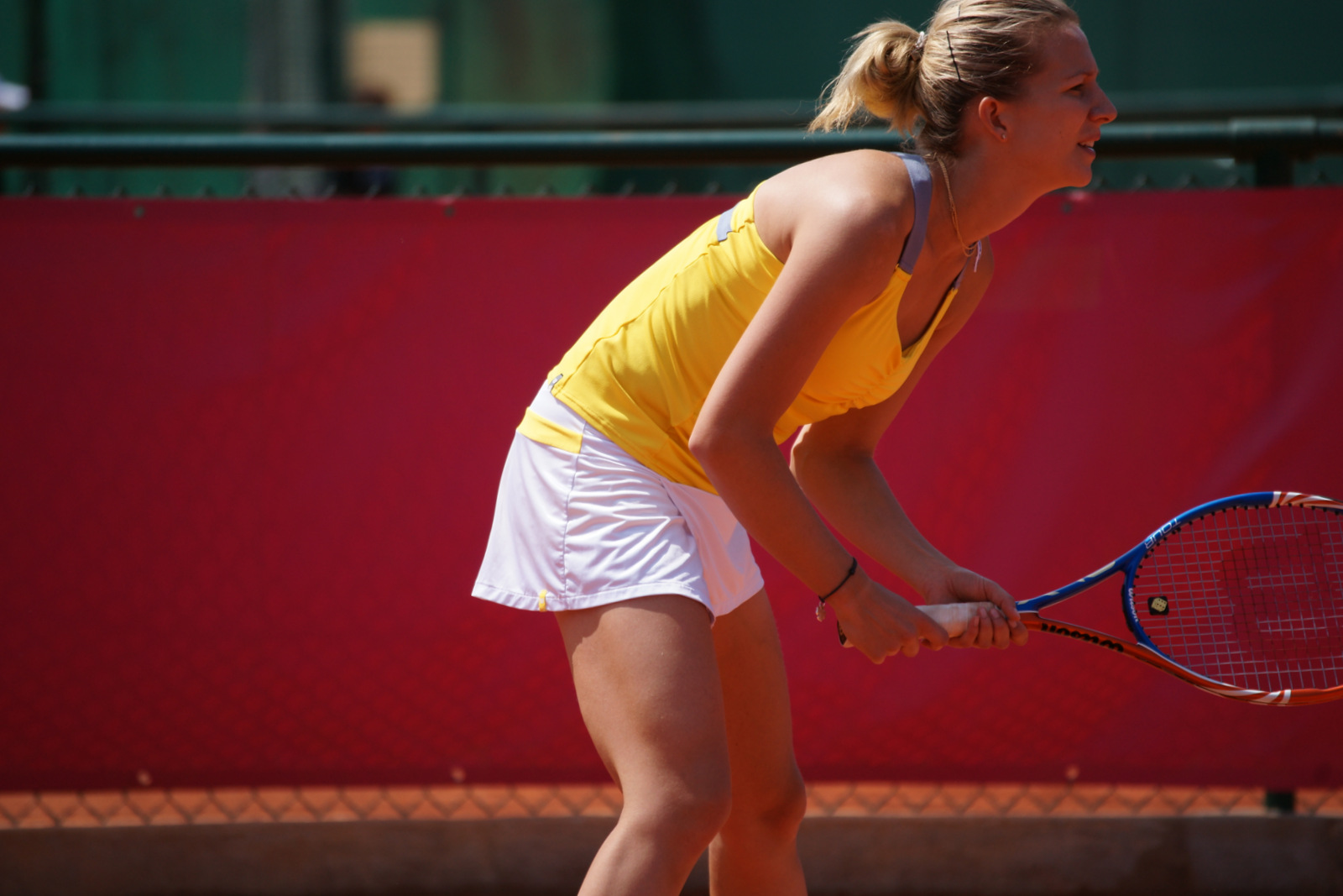 Marta Domachowska, Open tennis Cagnes-sur-Mer 2011